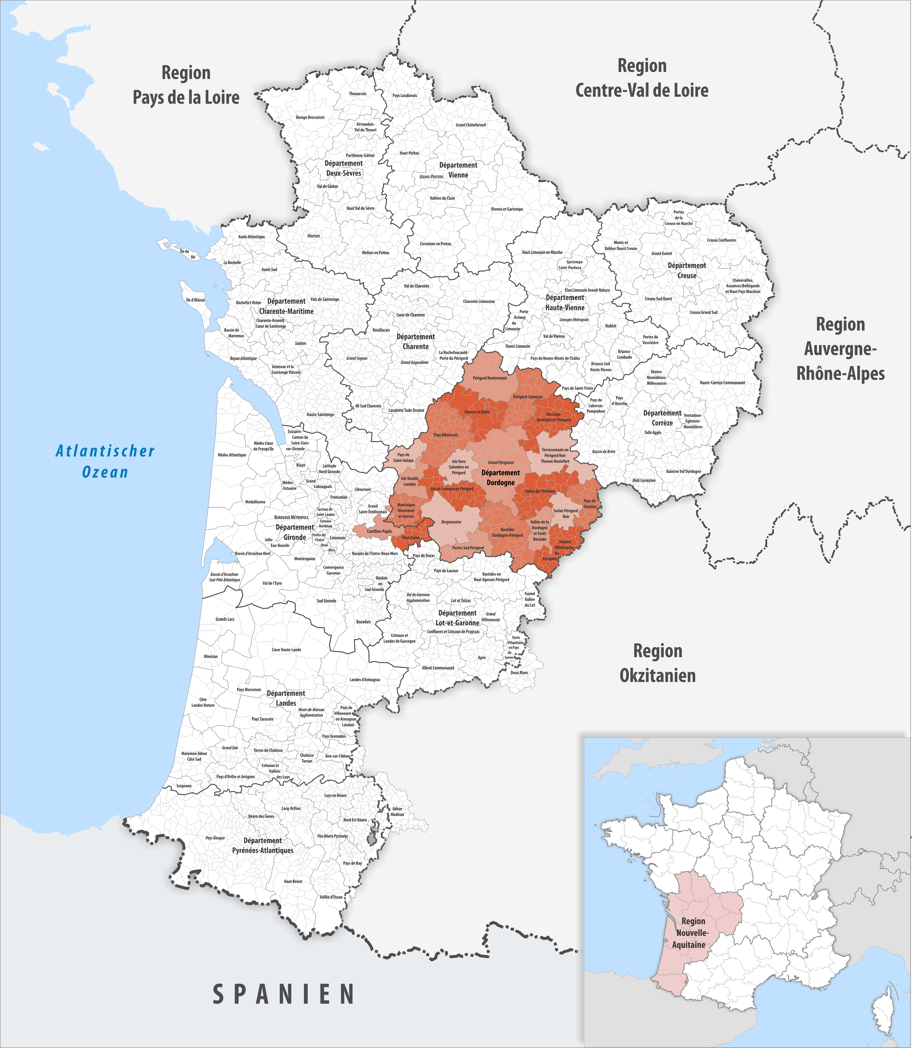 Gemeindeverbände im Département Dordogne